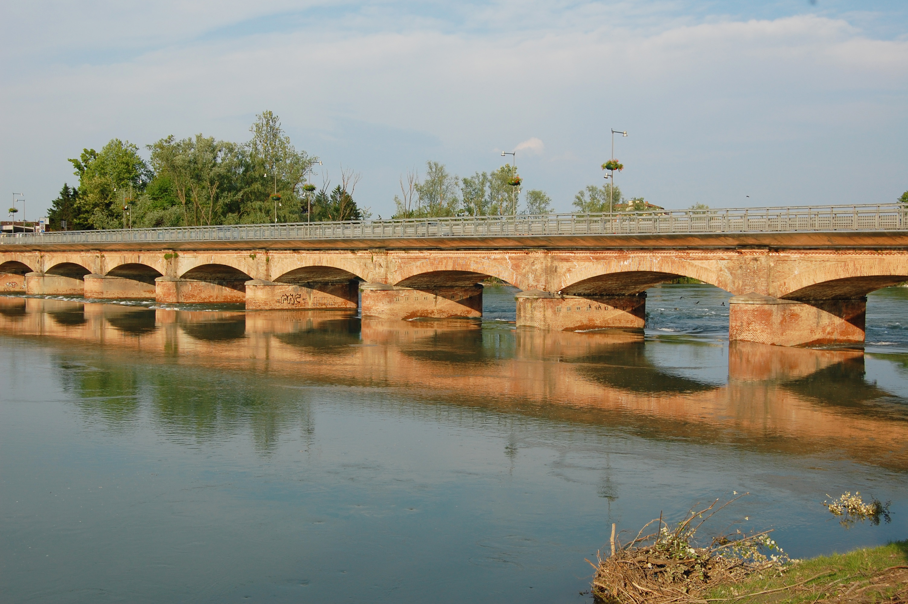 Il ponte di Lodi visto dalla riva destra dell'Adda